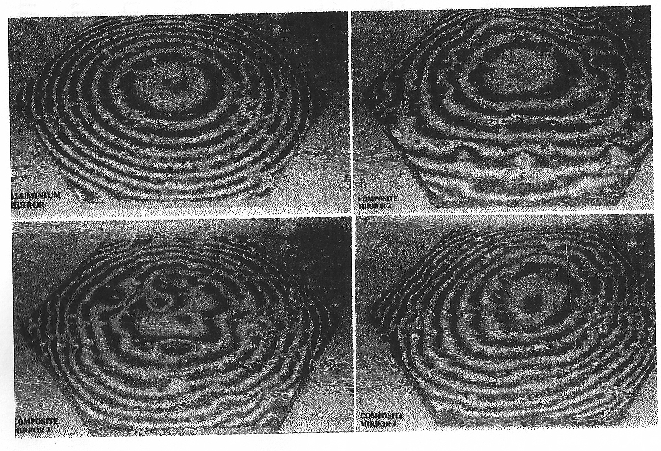 תבניות מוארה שהתקבלו בבדיקה של ארבע מראות משושות בהתאבכות בין תבנית קוים צפופים ובין השיקוף שלה. הבדיקה בוצעה במהלך פיתוח מרכז שמש מוטה מטרה ומתוקן אסטיגמטיות על ידי חברת רותם תעשיות בפרק רותם בשנים 1995-2000. מרכז השמש הועבר לגן הסולארי בניצנה בשנת 2003.